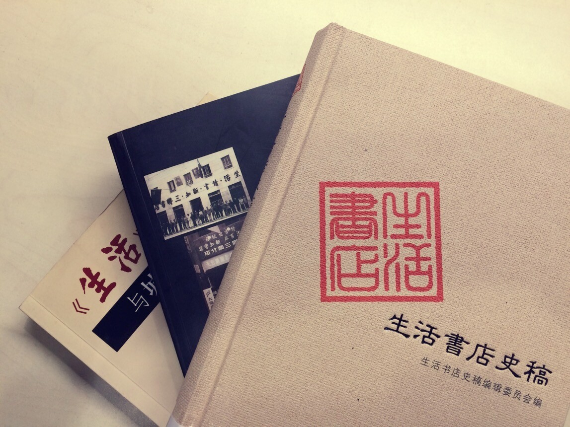 中文（中国大陆）: 生活书店史稿